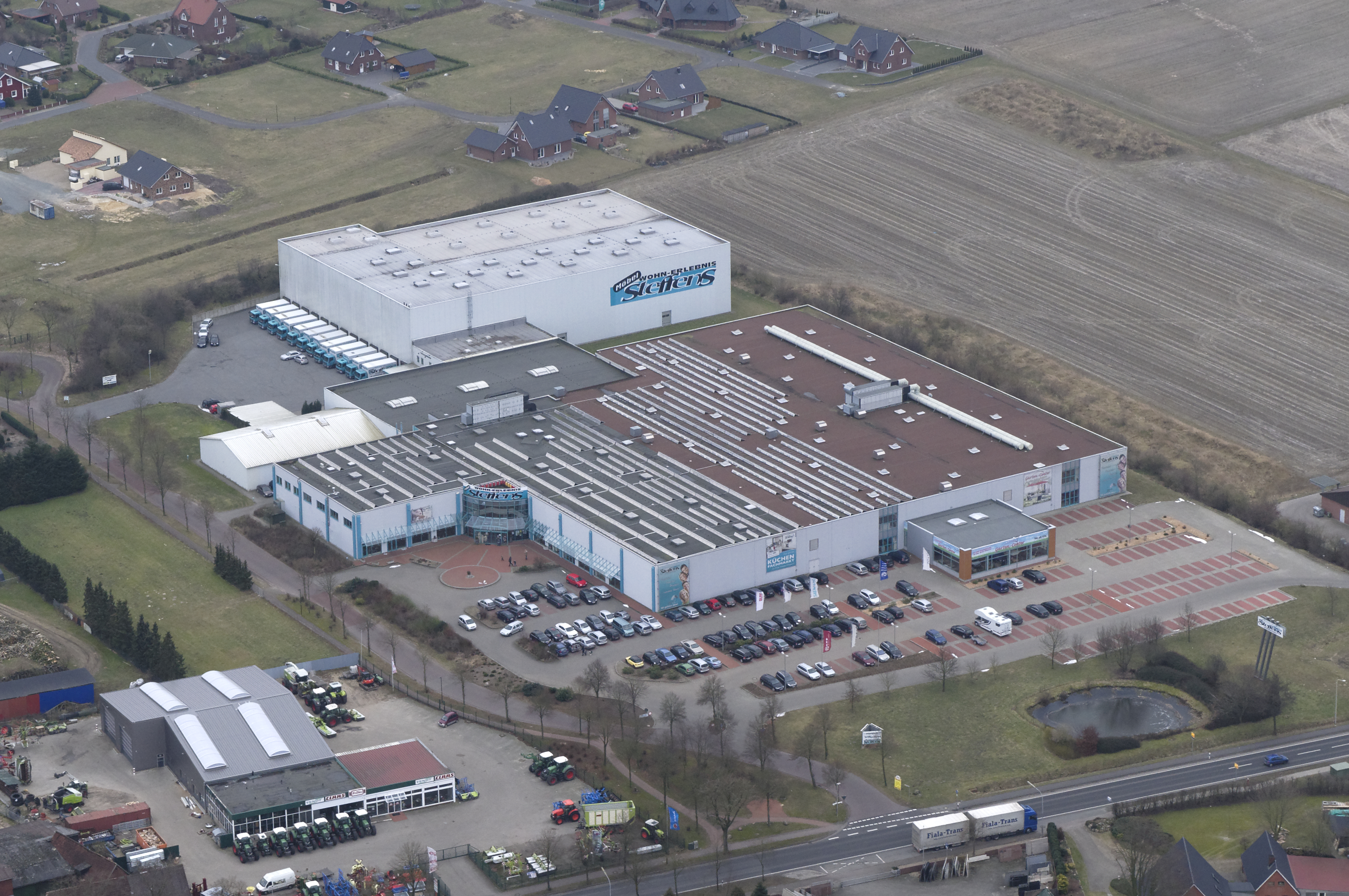 Luftaufnahme von Lamstedt: Fricke Landmaschinen und Wohn-Erlebnis Steffens